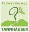 Piktogramm des Tannhäuser-Radwanderweges.